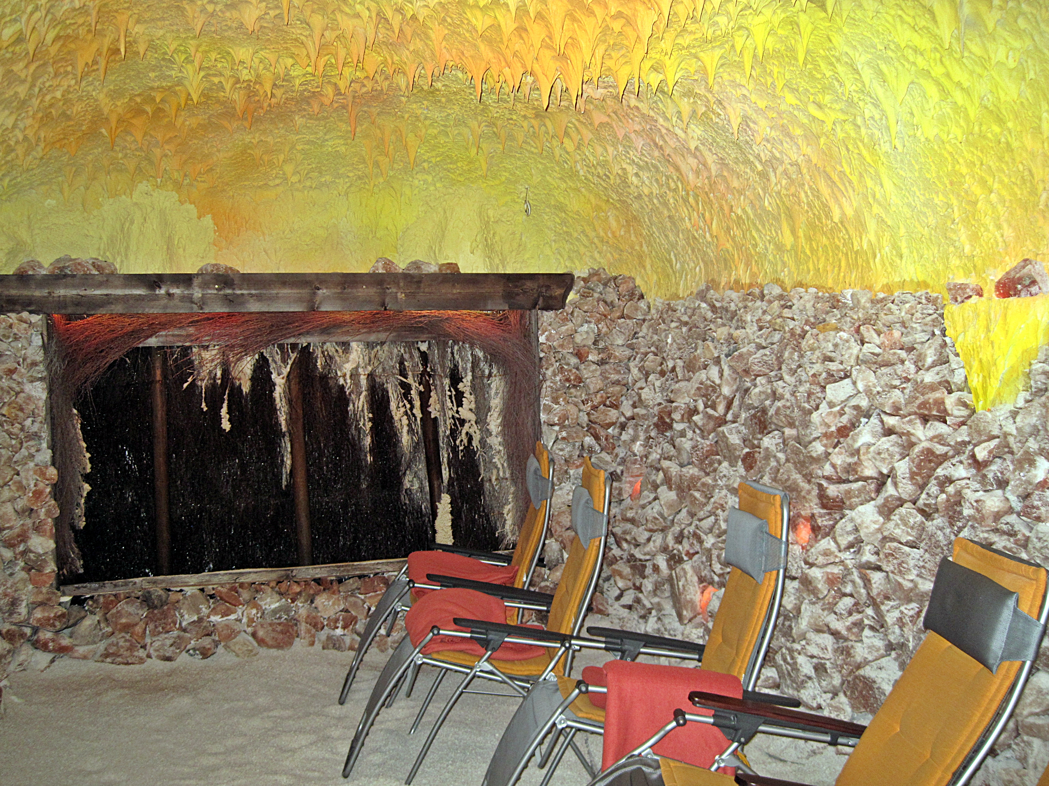 Bad Rothenfelde, Kurhaus, Salzgrotte